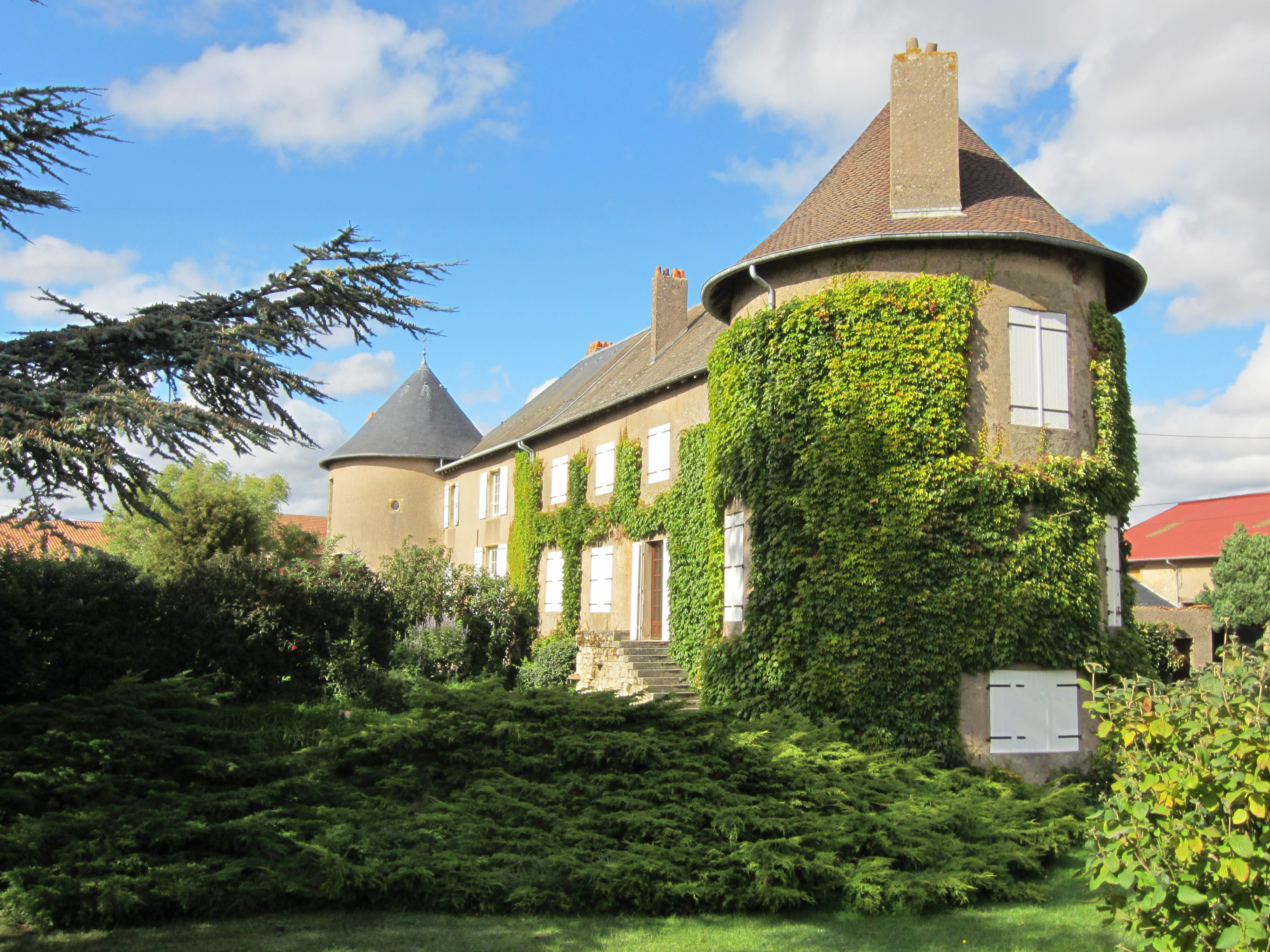 Description chateau Mars la Tour chateau Mars la Tour